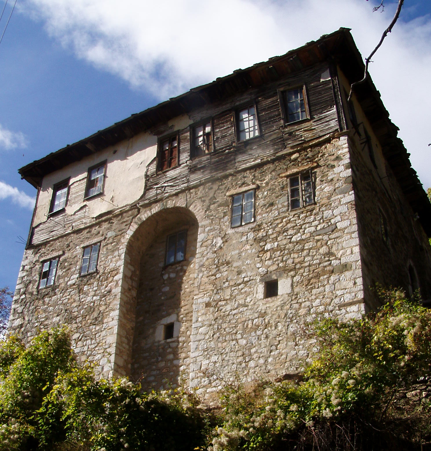 Куќа с.Галичник фам. Фрчковски